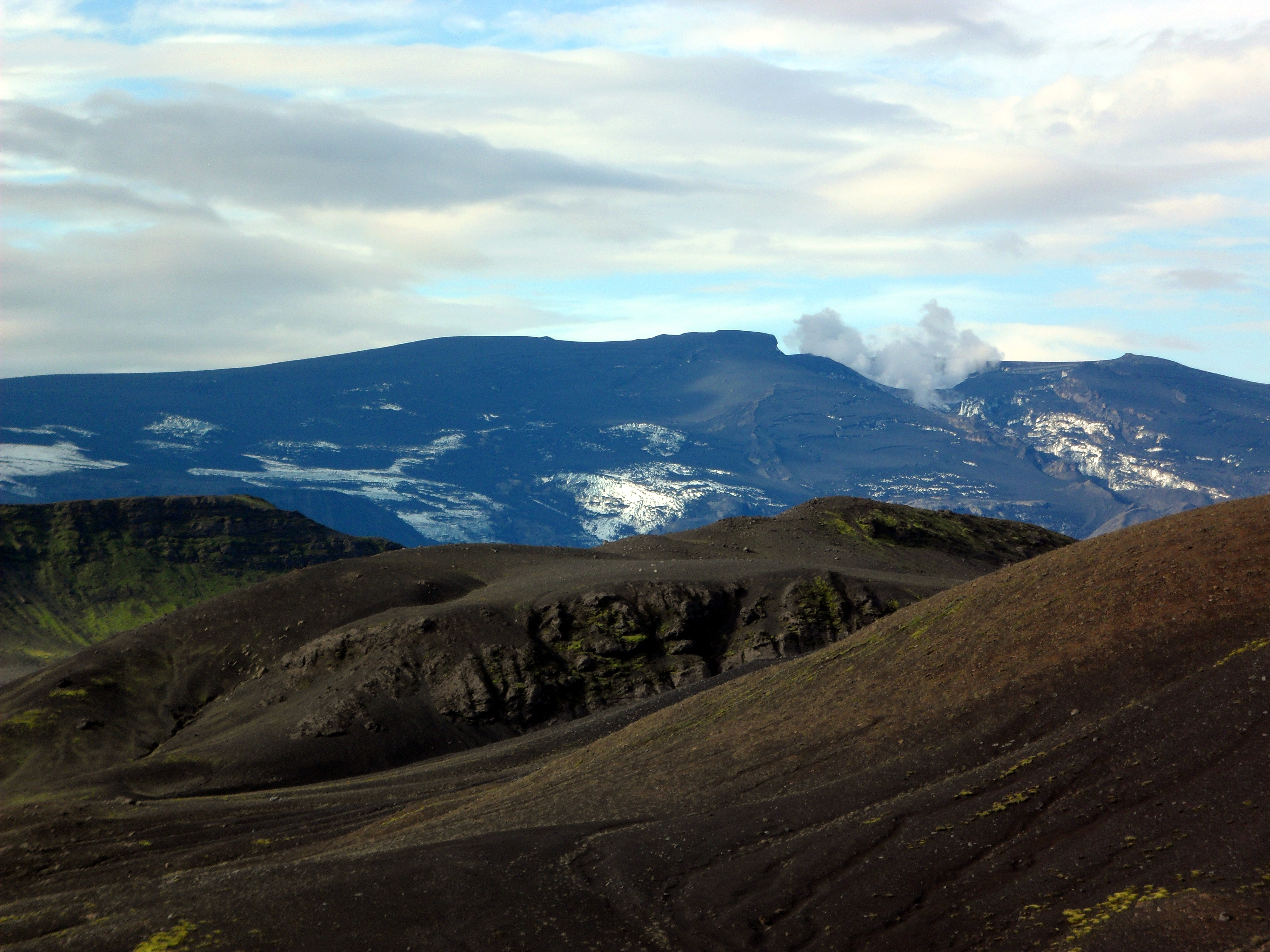 Eyjafjallajökull